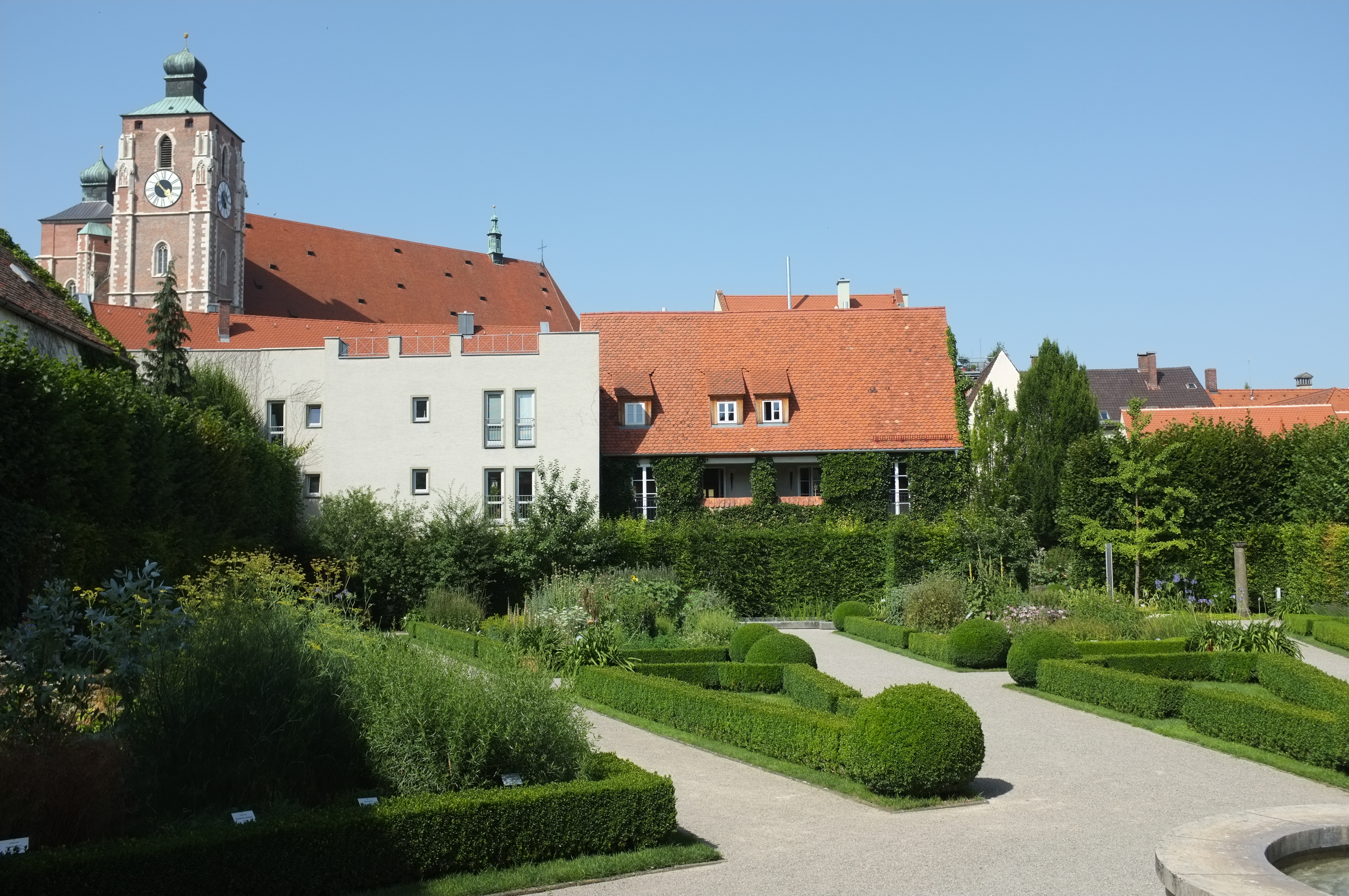 Botanischer Garten der Alten Anatomie mit Blick auf das Münster